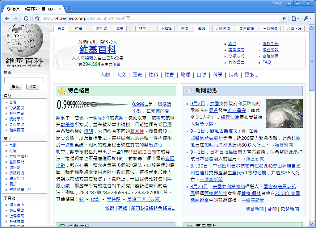 顯示中文維基的Google Chrome Beta版。